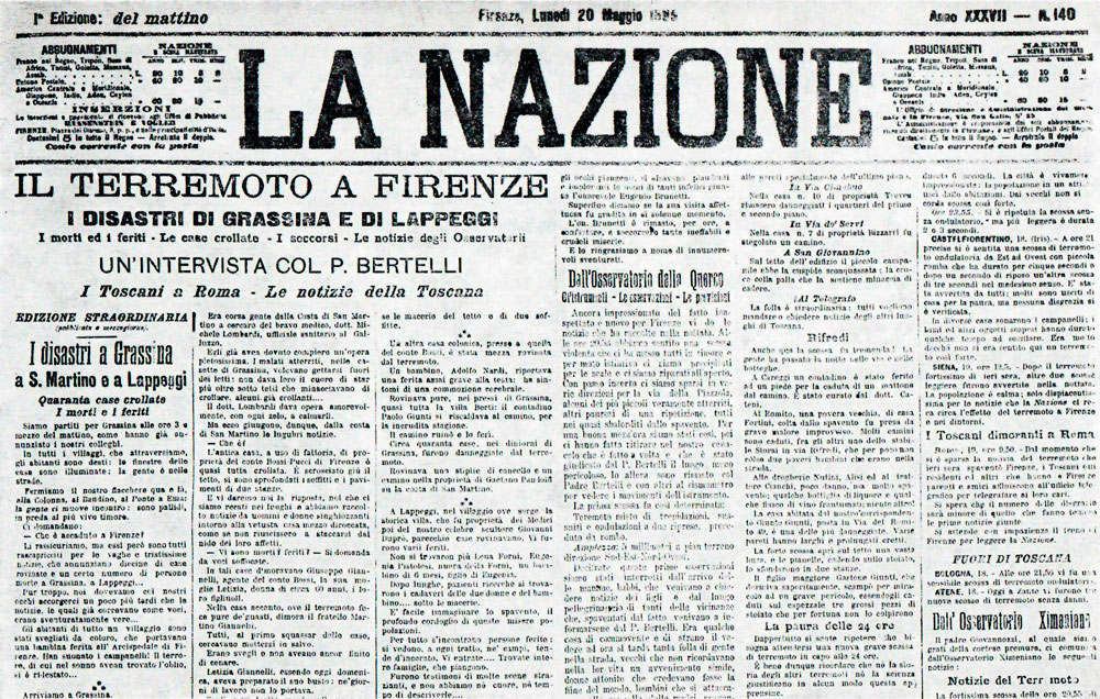 Prima pagina del quotidiano La Nazione con la notizia del terremoto di Firenze del 1895